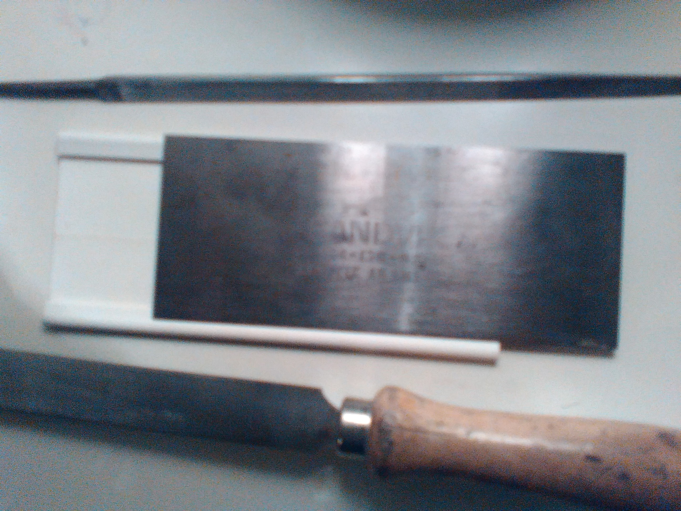 Síklingur og þau verkfæri sem eru notuð við að brýna.